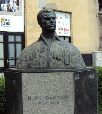 Попрсје Ђуре Ђаковаића сам лично фотографисао датума 28. априла 2010. године у Загребу.